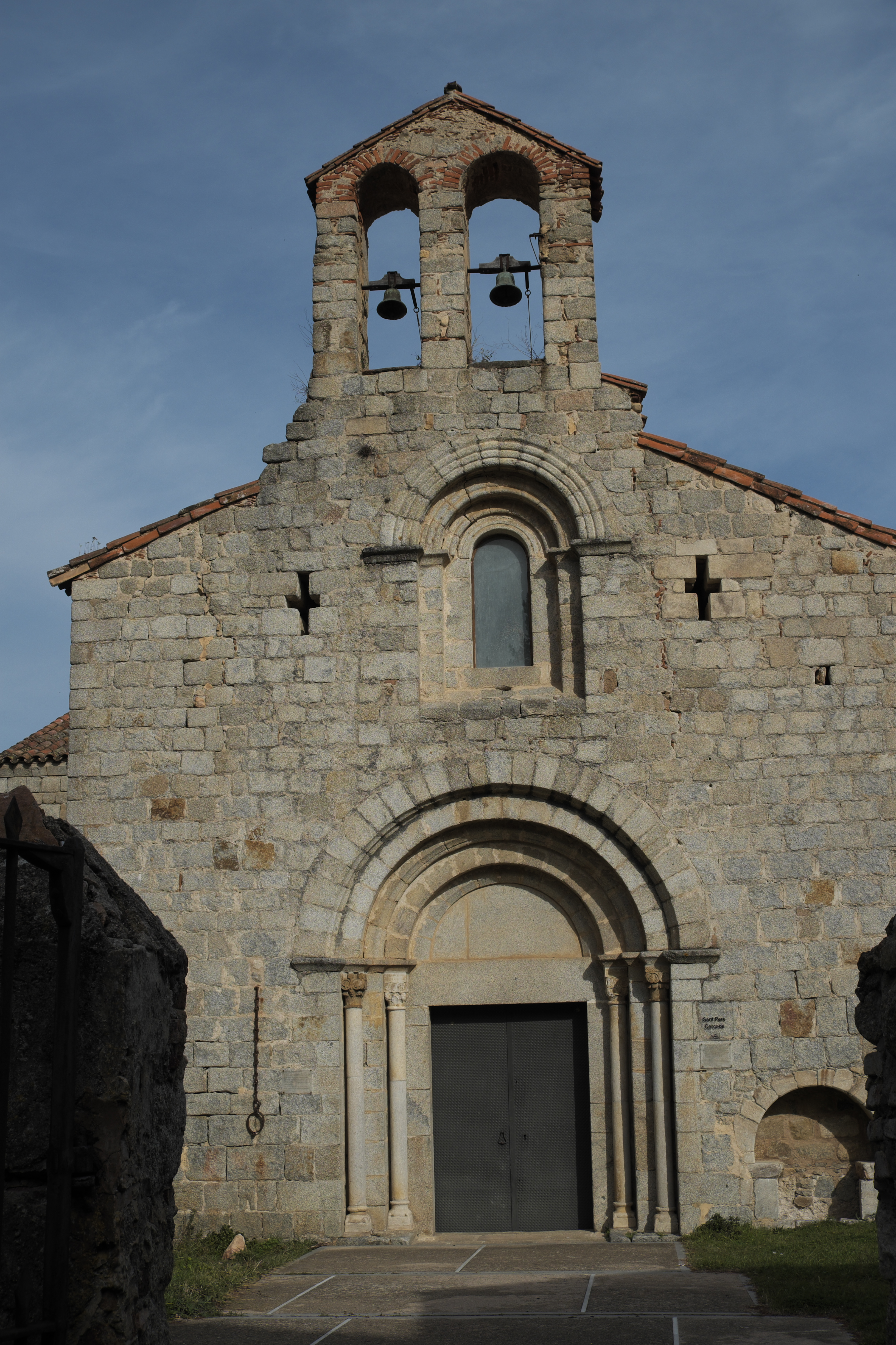 Ehemalige Klosterkirche Sant Pere Cercada in Santa Coloma de Farners in der Provinz Girona (Katalonien/Spanien)